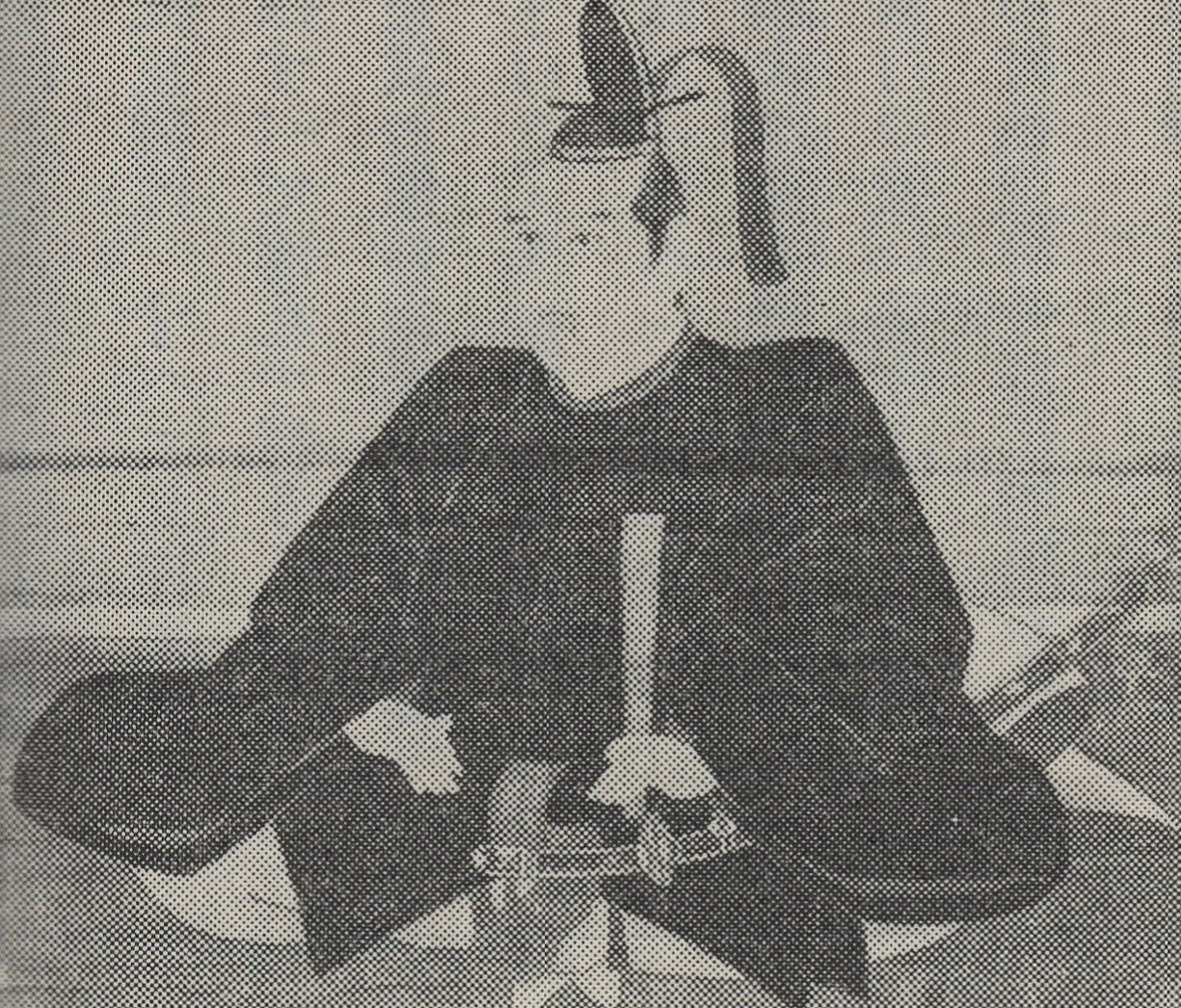 池田輝興の肖像(モノクロ)。